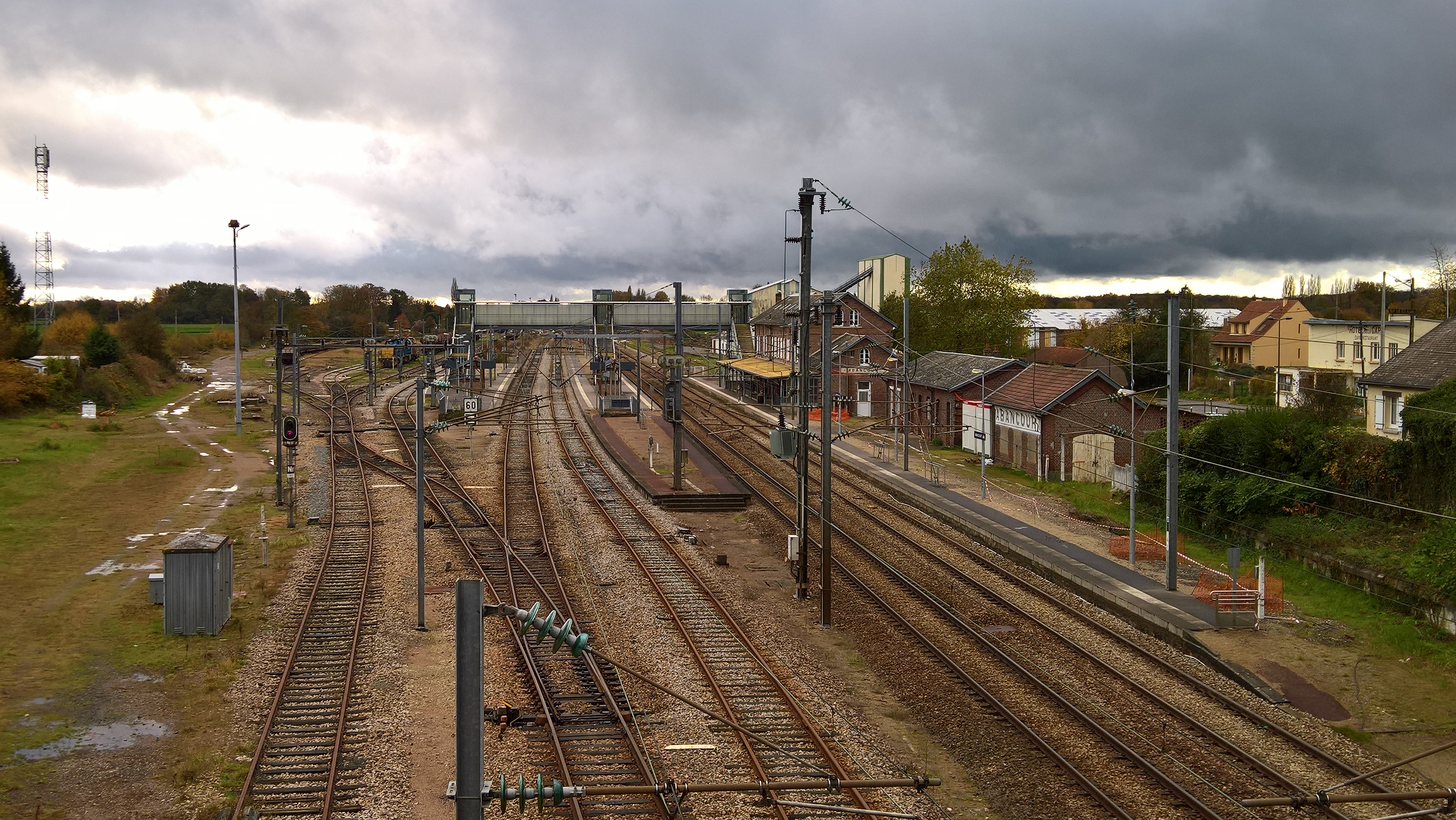 Gare d'Abancourt, vue depuis le pont de la RD 7. Les deux voies à droite sont celles de Rouen-Amiens. A gauche sont les voies de Paris - Beauvais - Le Tréport-Mers, puis les voies de débord.